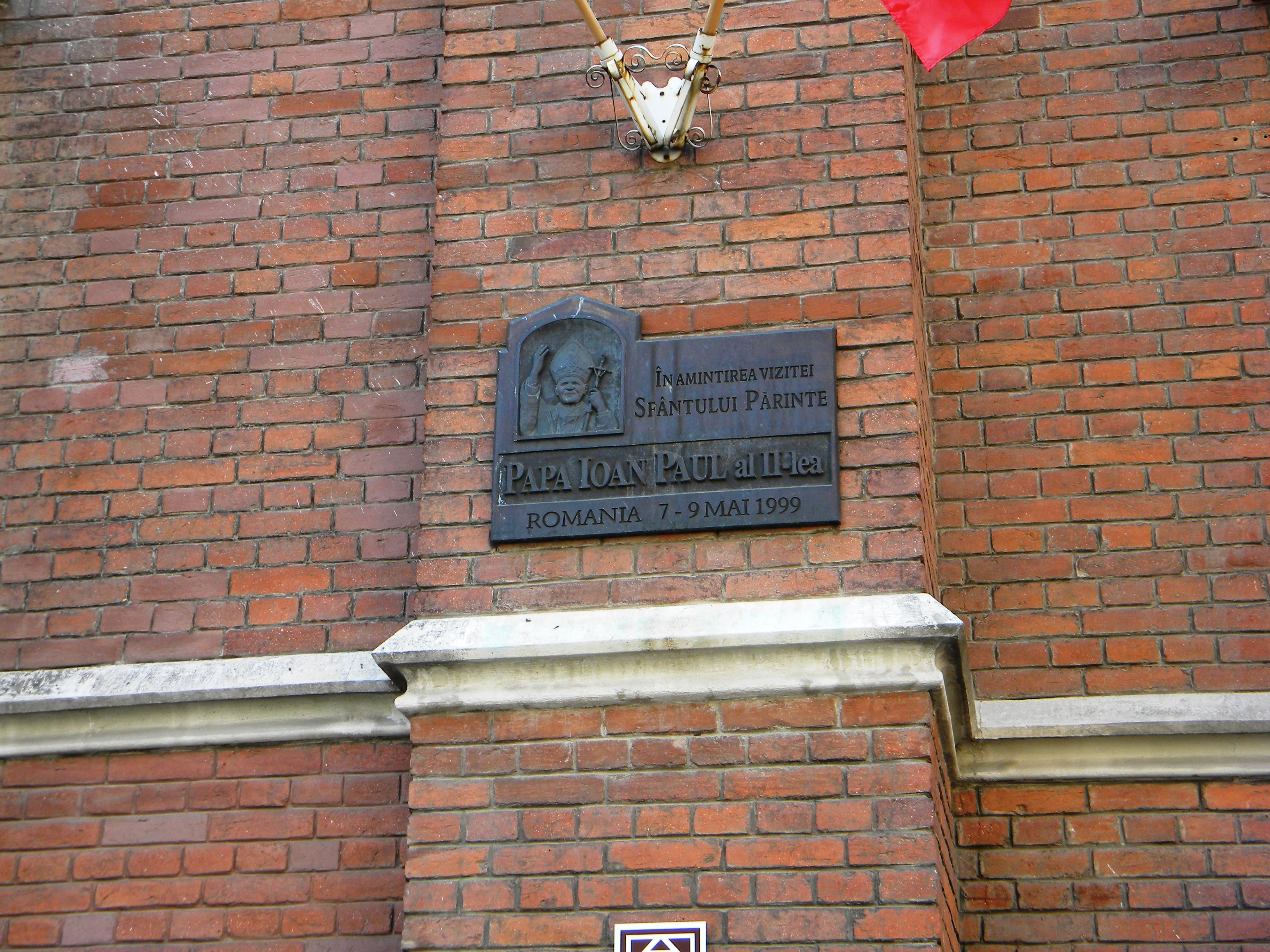 Catedrala Romano-Catolica "Sfantul Iosif,", Str. General Berthelot nr. 17, Bucuresti, sect. 1, placheta In amintirea Vizitei Sfantului Parinte PAPA IOAN PAUL al II-lea; 7-9 Mai 1999, Romania